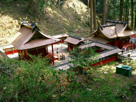 鳳来寺山東照宮。